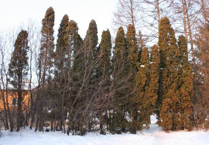 Živý plot, túje T. occidentalis 'Malonyana' Brno Komín